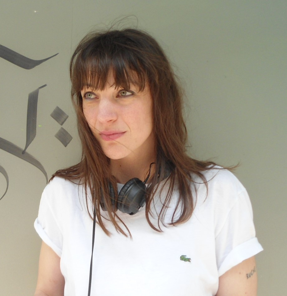 Die deutsche Schauspielerin/Filmschaffende Oona von Maydell